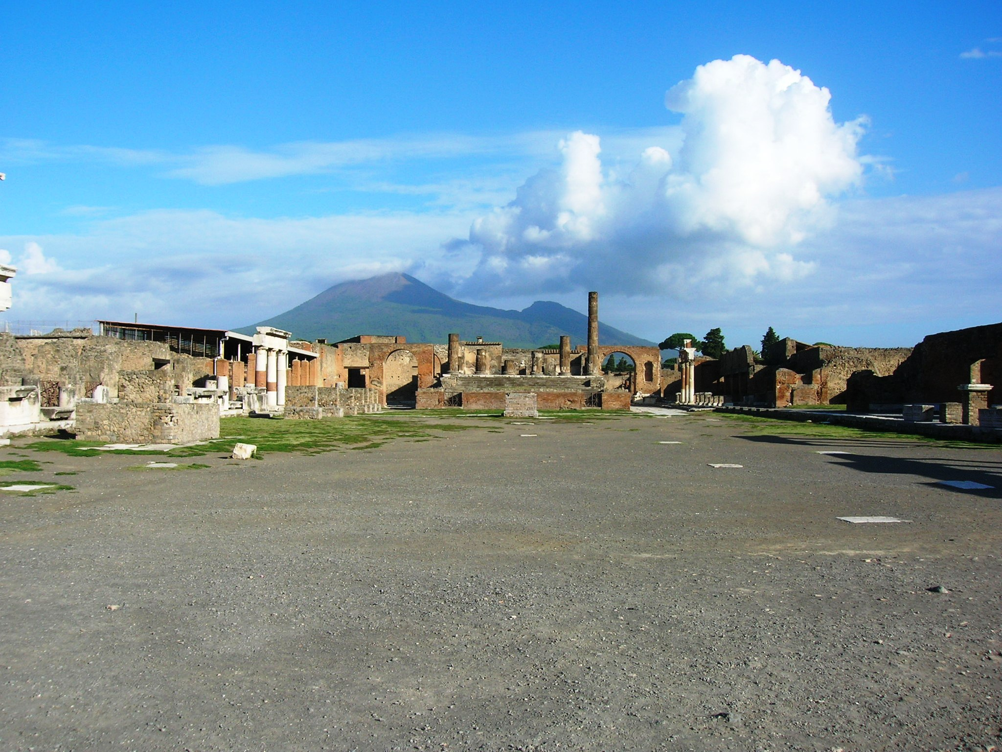 Il Foro di Pompei